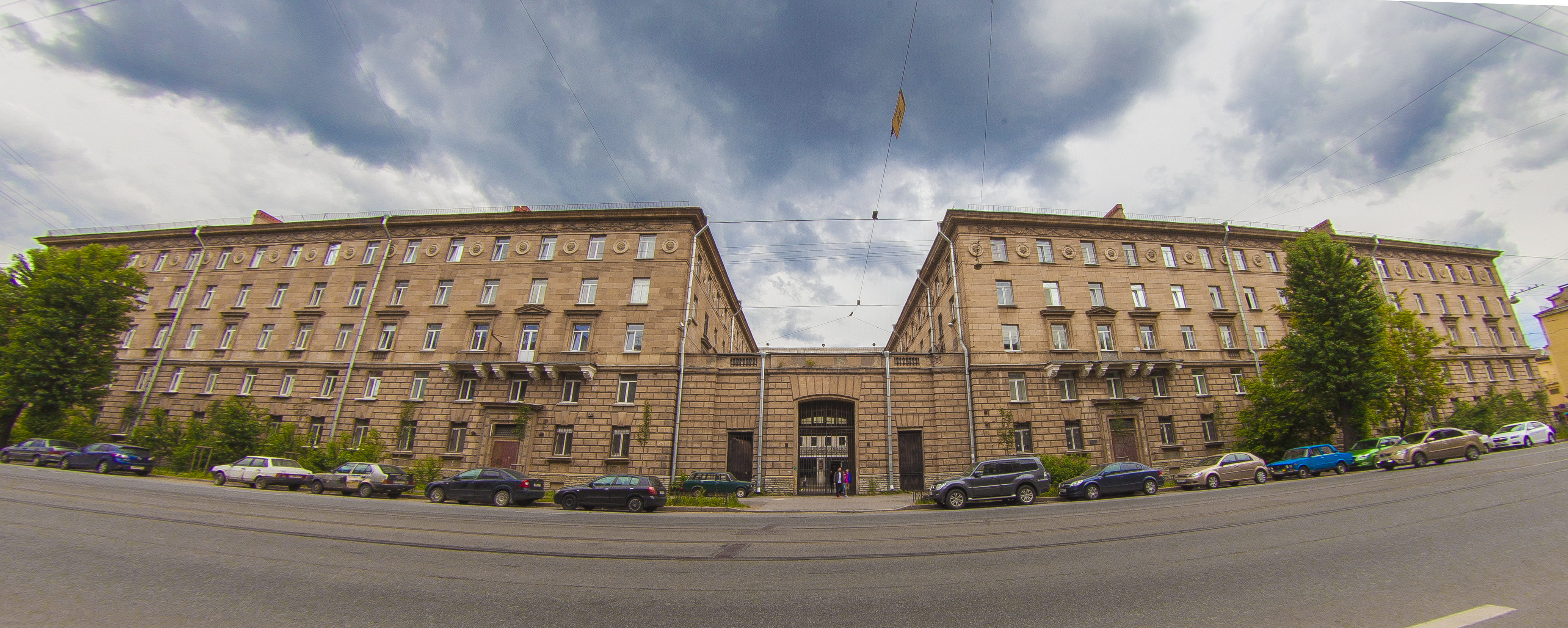 Студенческий комплекс Университета ИТМО в Вяземском переулке